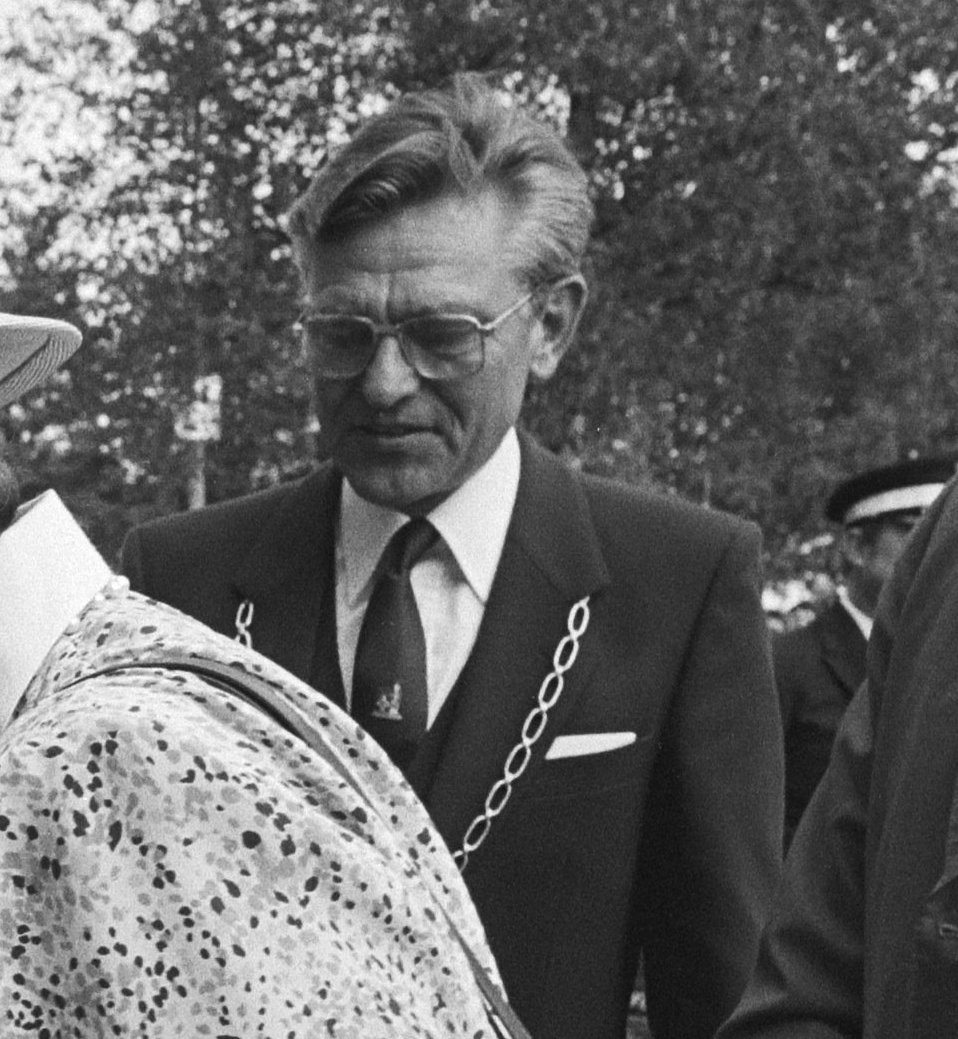 Collectie / Archief : Fotocollectie Anefo Reportage / Serie : [ onbekend ] Beschrijving : Bezoek Beatrix en Claus Noord-West-Overijssel, bezoek aan opvangcentrum voor vluchtelingen in klooster "Voorzienigheid" Datum : 18 mei 1981 Locatie : Overijssel, Steenwijkerwold Trefwoorden : VLUCHTELINGEN, bezoeken, kloosters, opvangcentra Persoonsnaam : Beatrix, koningin, Claus, prins Fotograaf : Antonisse, Marcel / Anefo Auteursrechthebbende : Nationaal Archief Materiaalsoort : Negatief (zwart/wit) Nummer archiefinventaris : bekijk toegang 2.24.01.05 Bestanddeelnummer : 931-4926